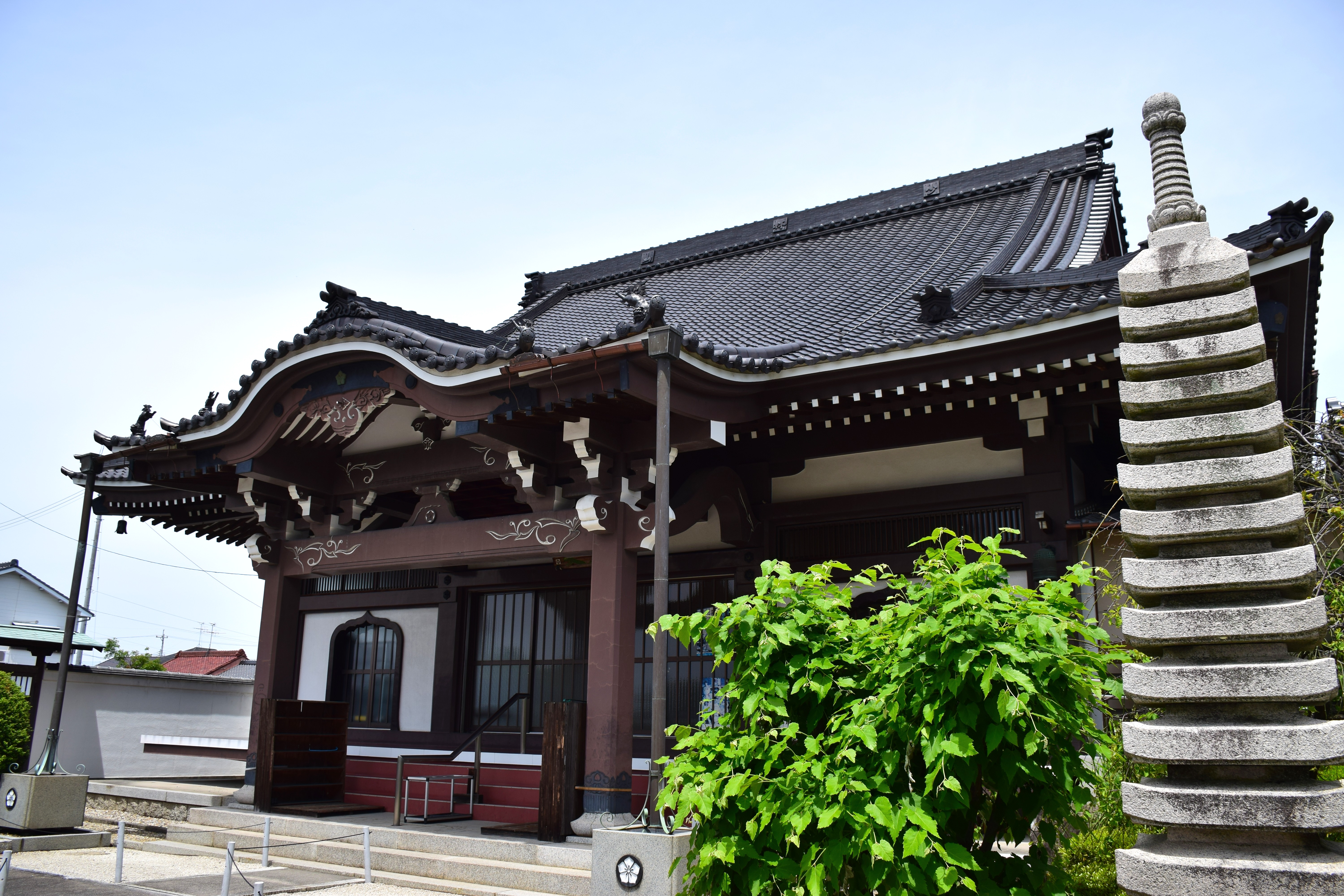 新徳寺本堂